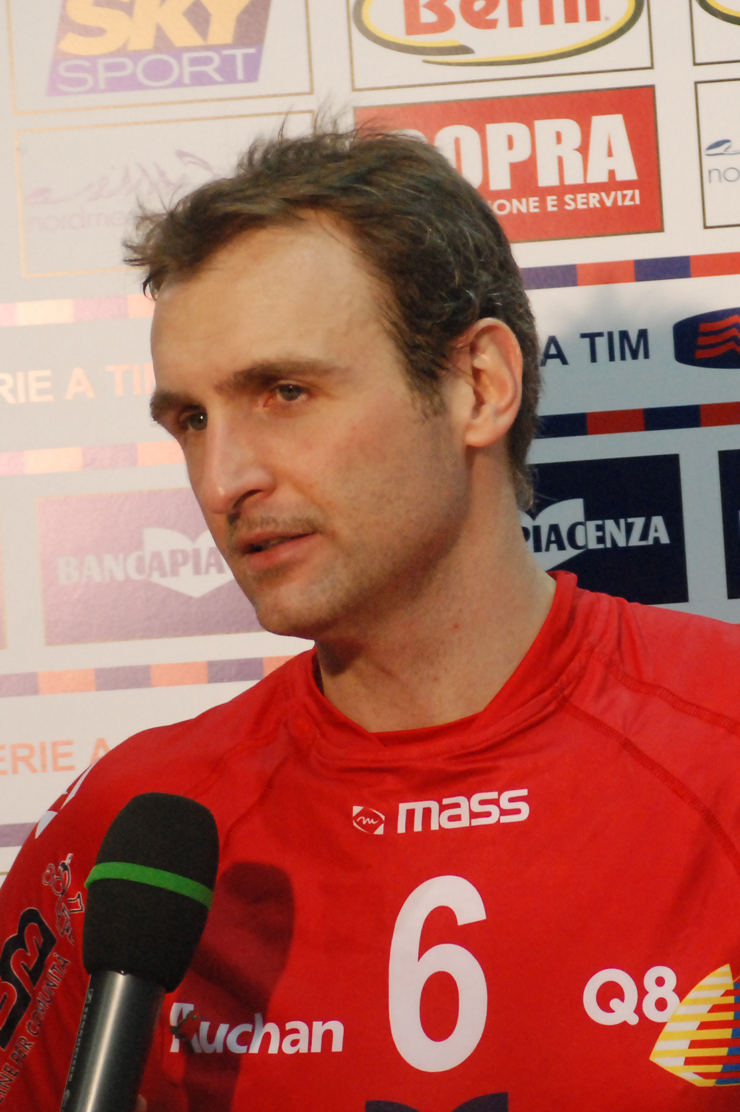 Foto scattata nel campionato 2008-2009 di Marco Meoni